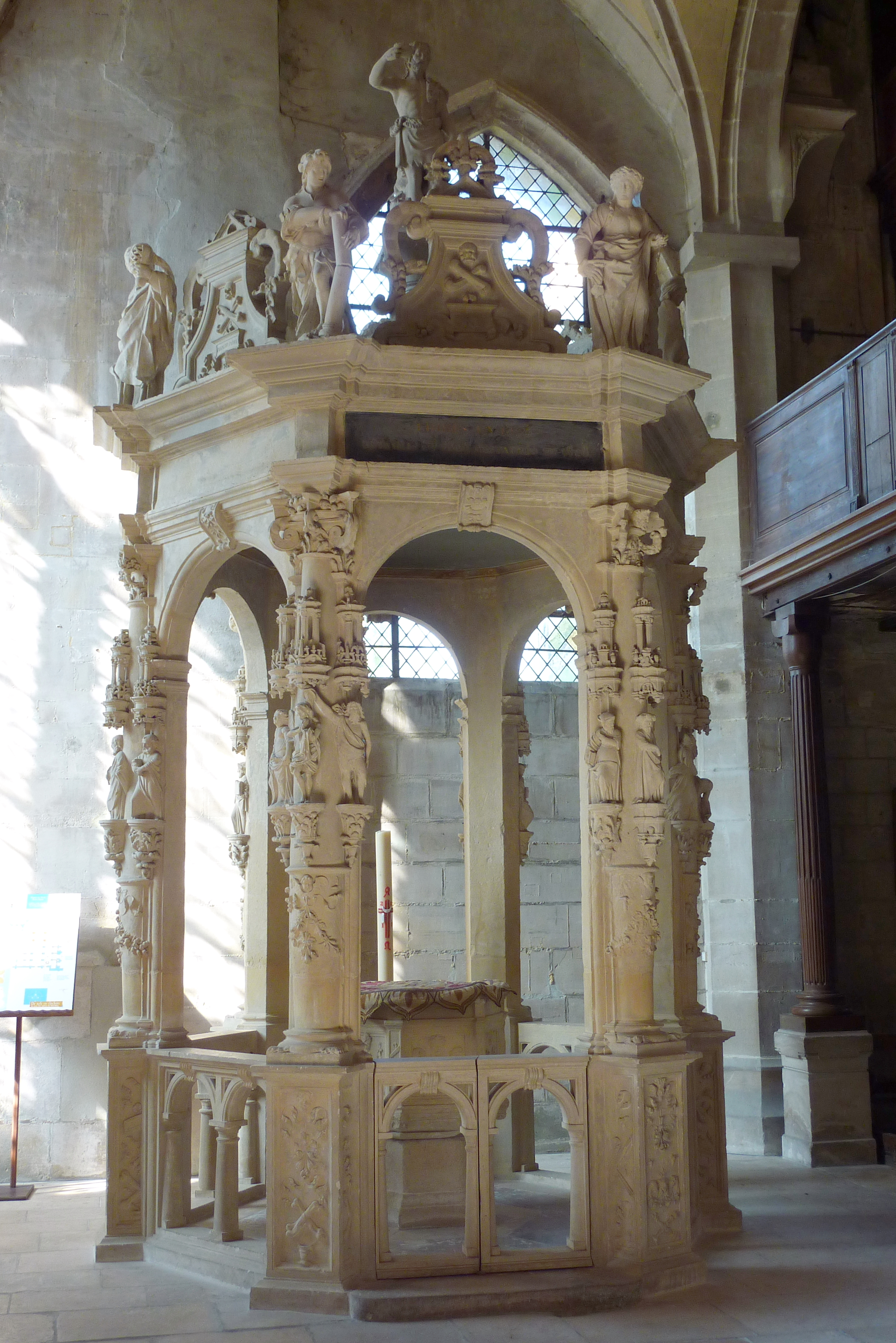 Baptisterium in der Kirche Notre-Dame-de-la-Nativité in Magny-en-Vexin